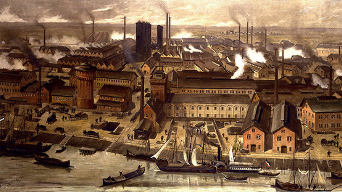 BASF Werk Ludwigshafen 1881, Gemälde im BASF-Archiv